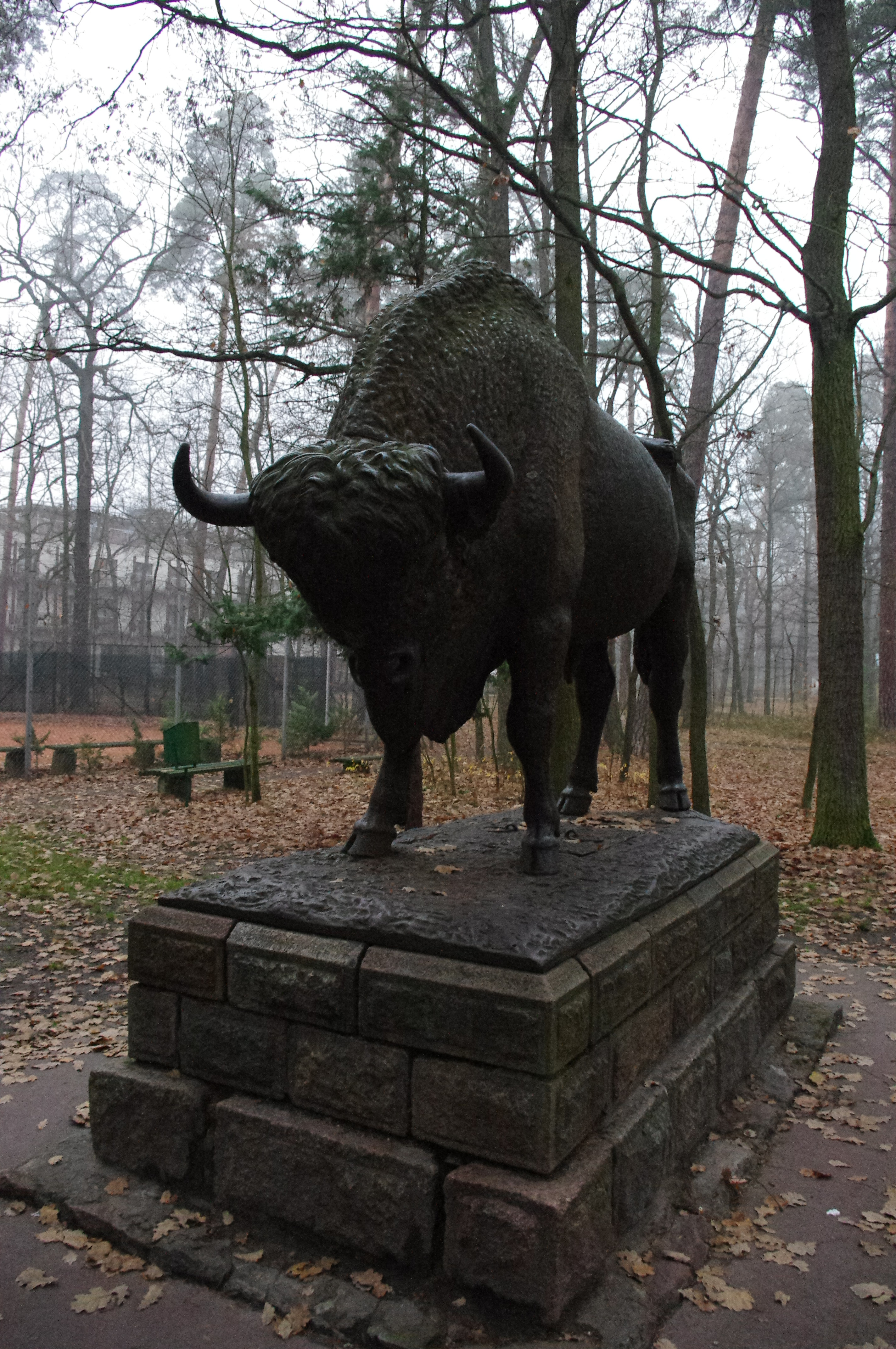 Spalski Żubr